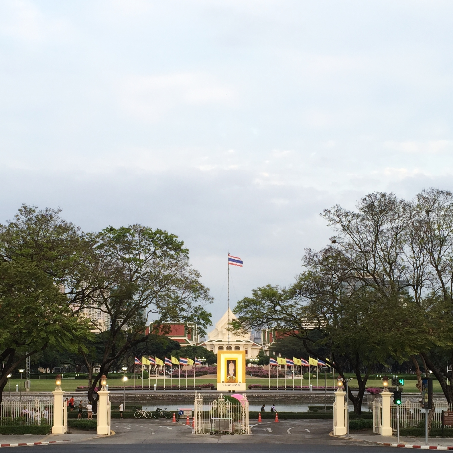 ด้านหน้าจุฬาลงกรณ์มหาวิทยาลัย ฝั่งตะวันออกของถนนพญาไท